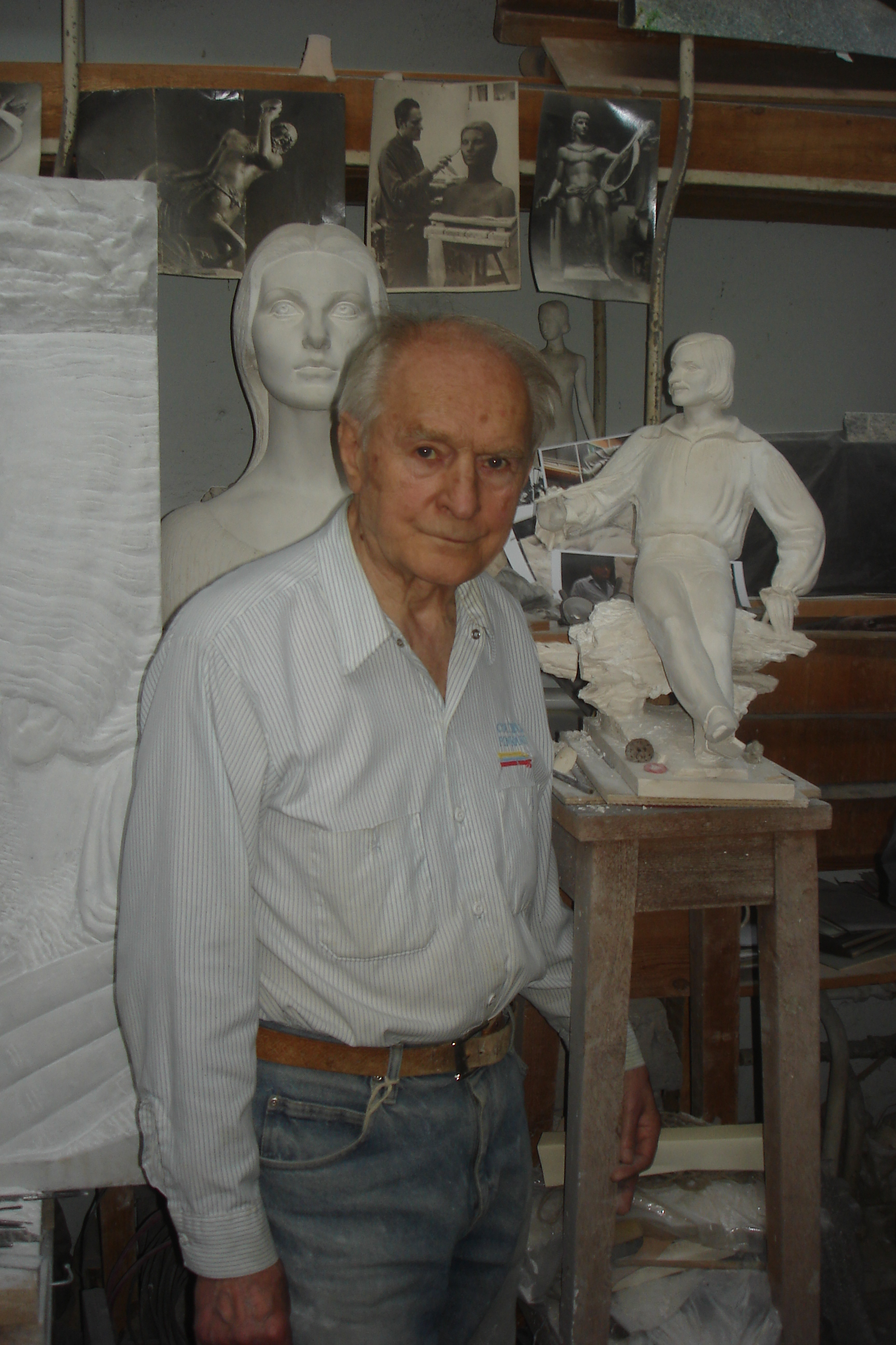 заслужений діяч мистецтв, скульптор Довгань Борис Степанович в своїй майстерні